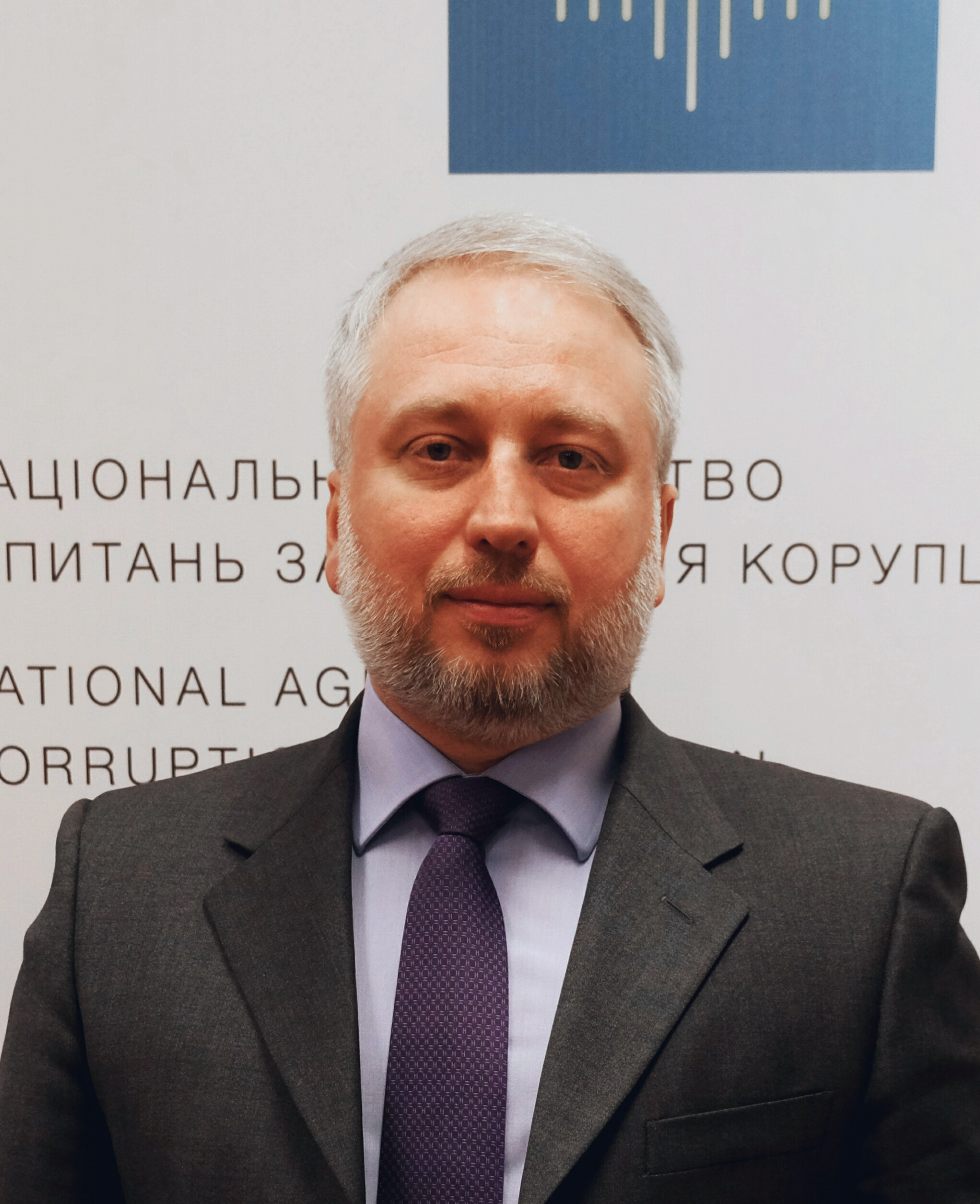 Олександр МАнгул